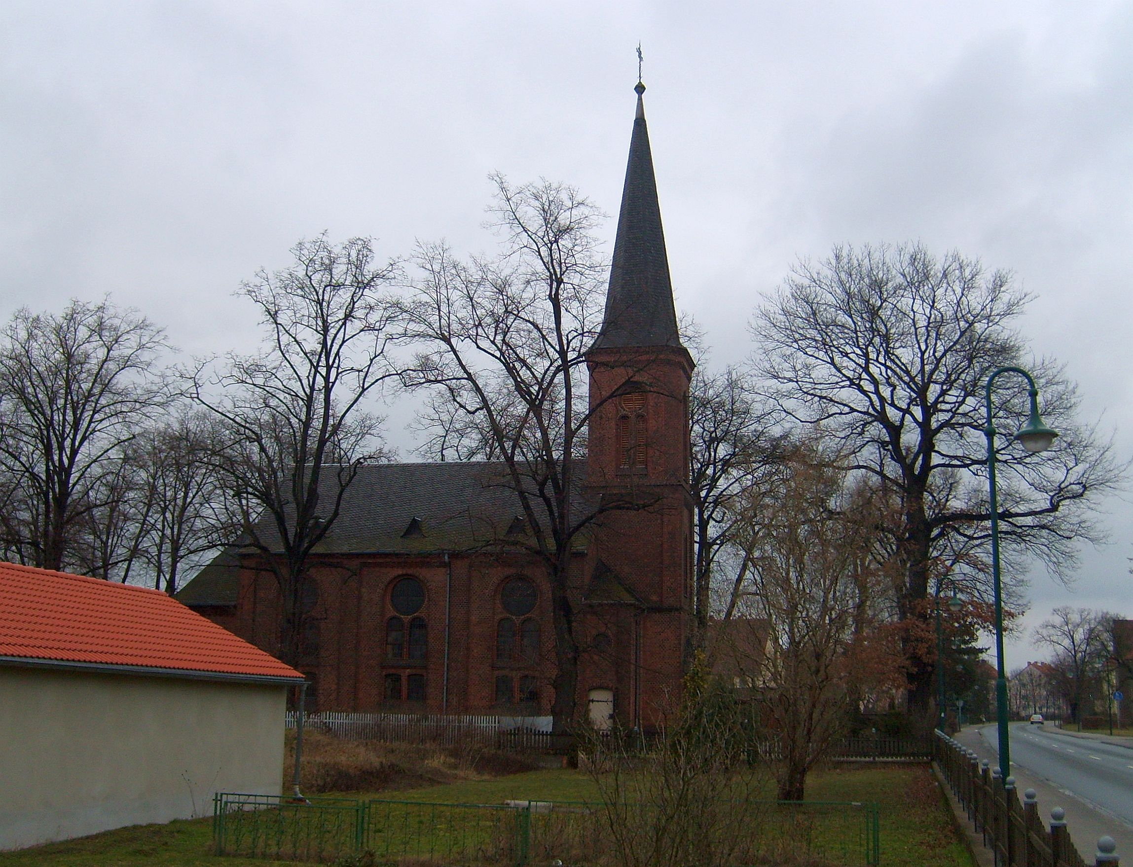 Gröditz.